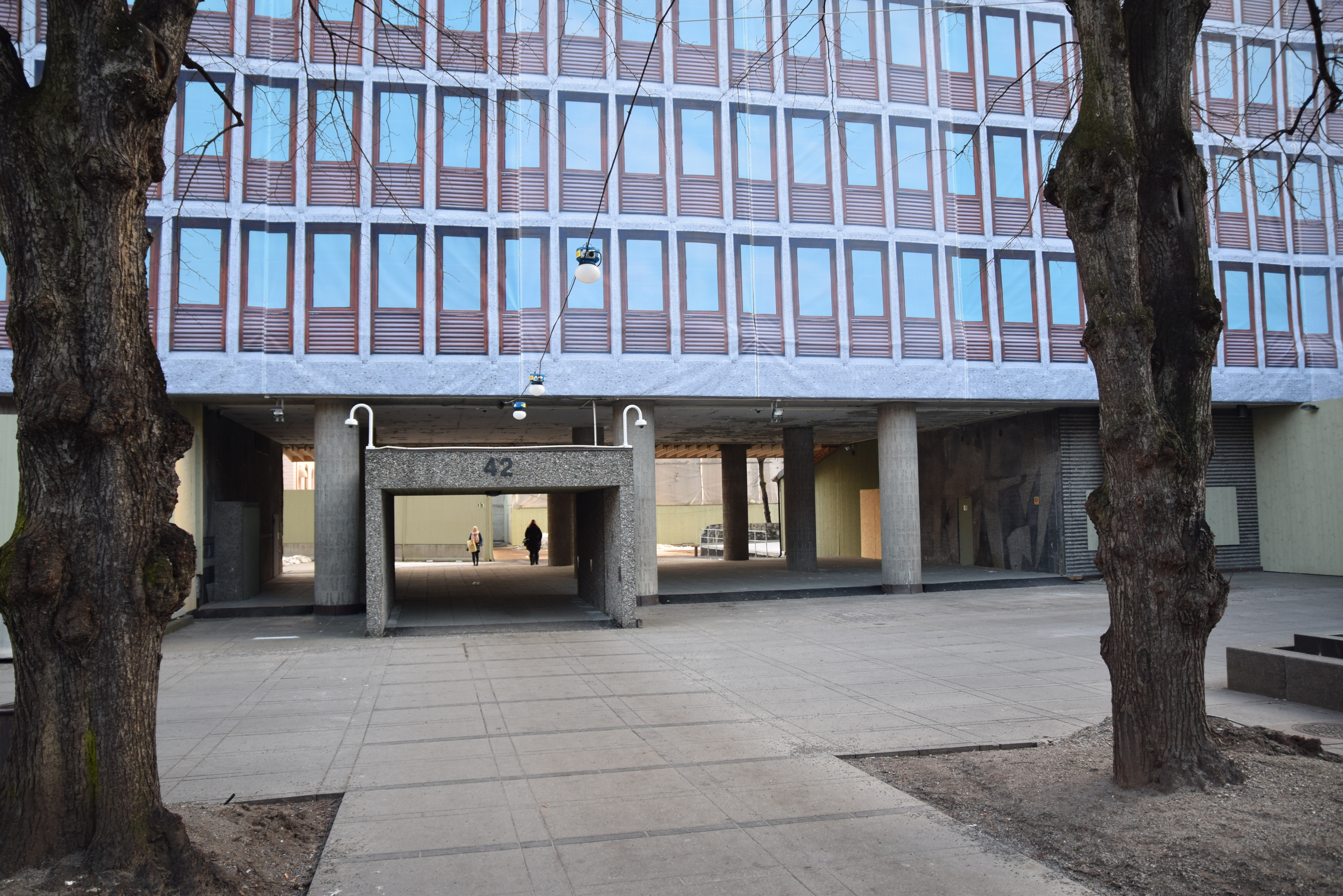 Høyblokken i februar 2015, med duk som viser tidligere fasade og åpning med gjennomgang for publikum. Lindealleen nærmest.